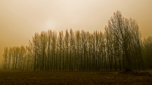 Imagen de Tardesillas (Soria). Paraje de Las Raposeras.